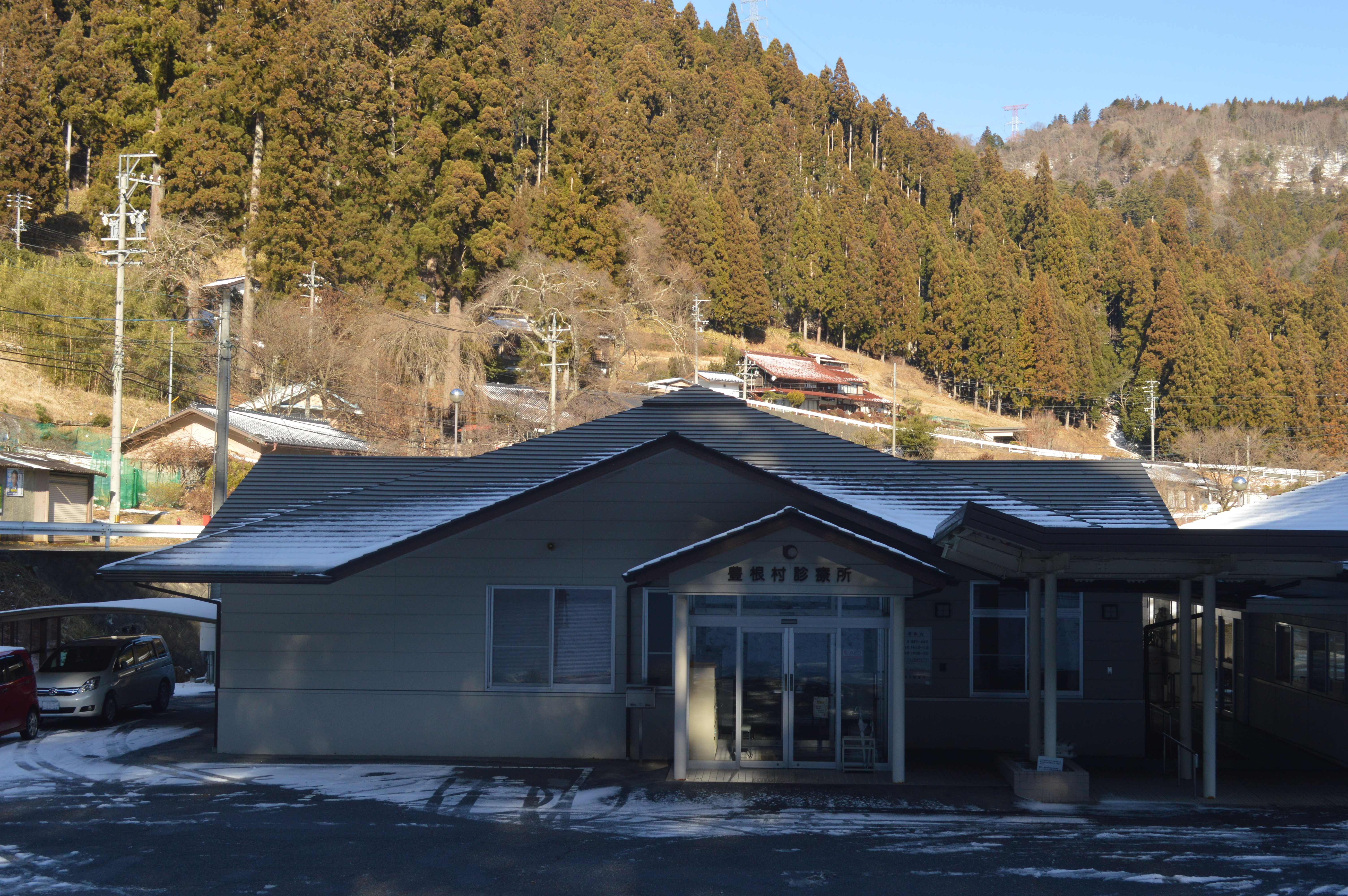 愛知県北設楽郡豊根村の豊根村診療所。